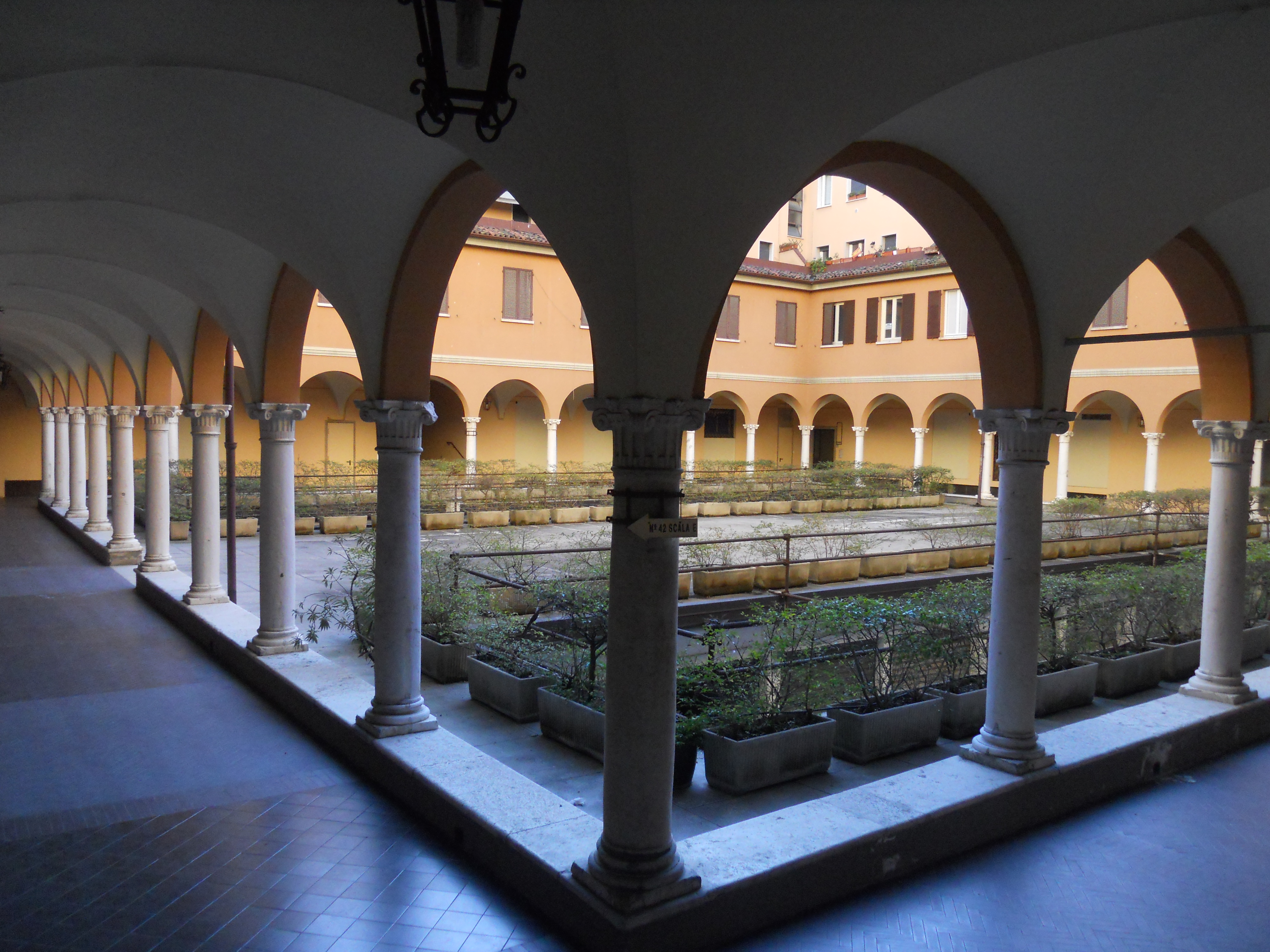 chiostro maggiore della distrutta chiesa di san domenico (Brescia)